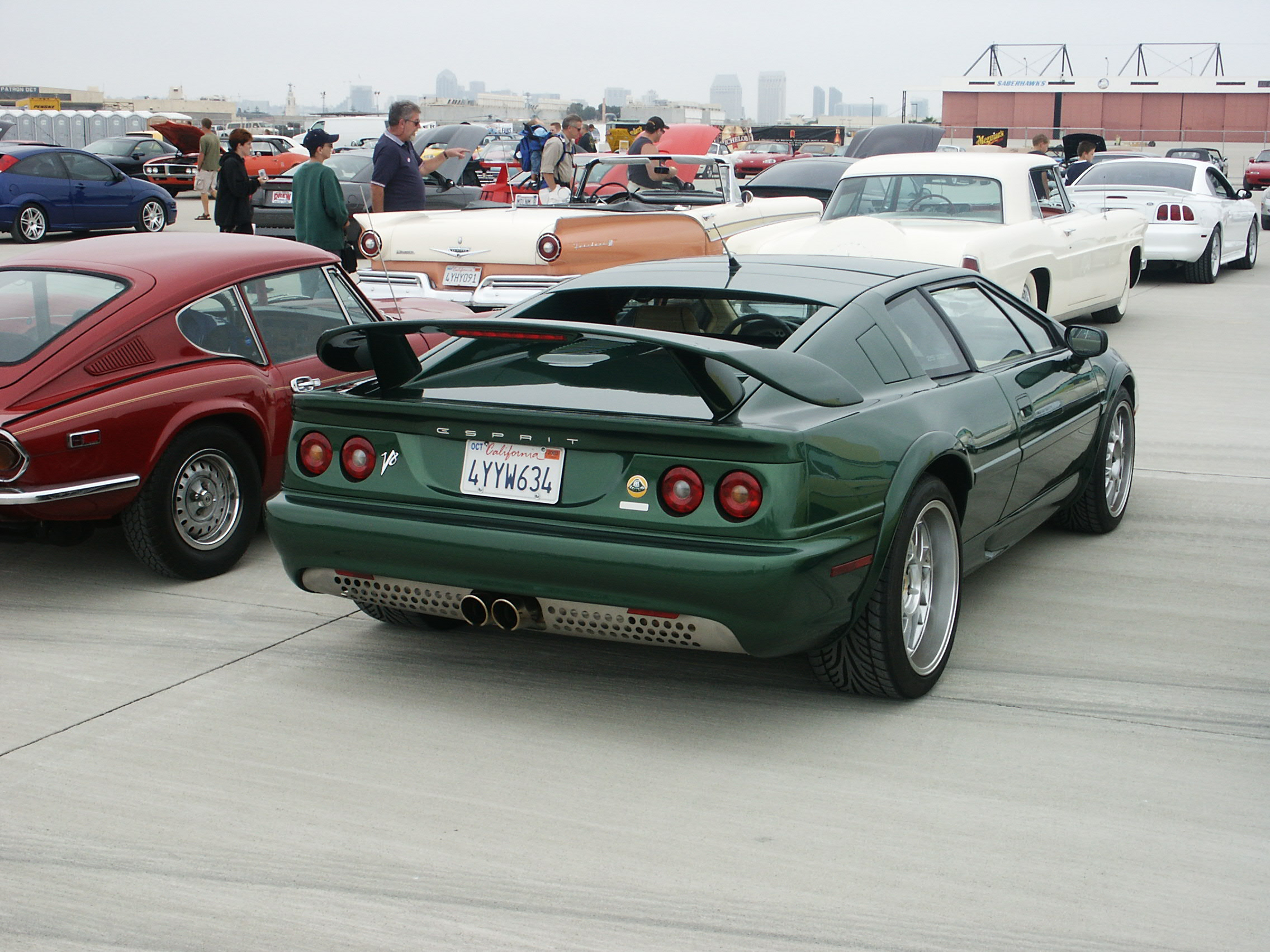 Green Lotus Esprit V8 2001 US-Version back